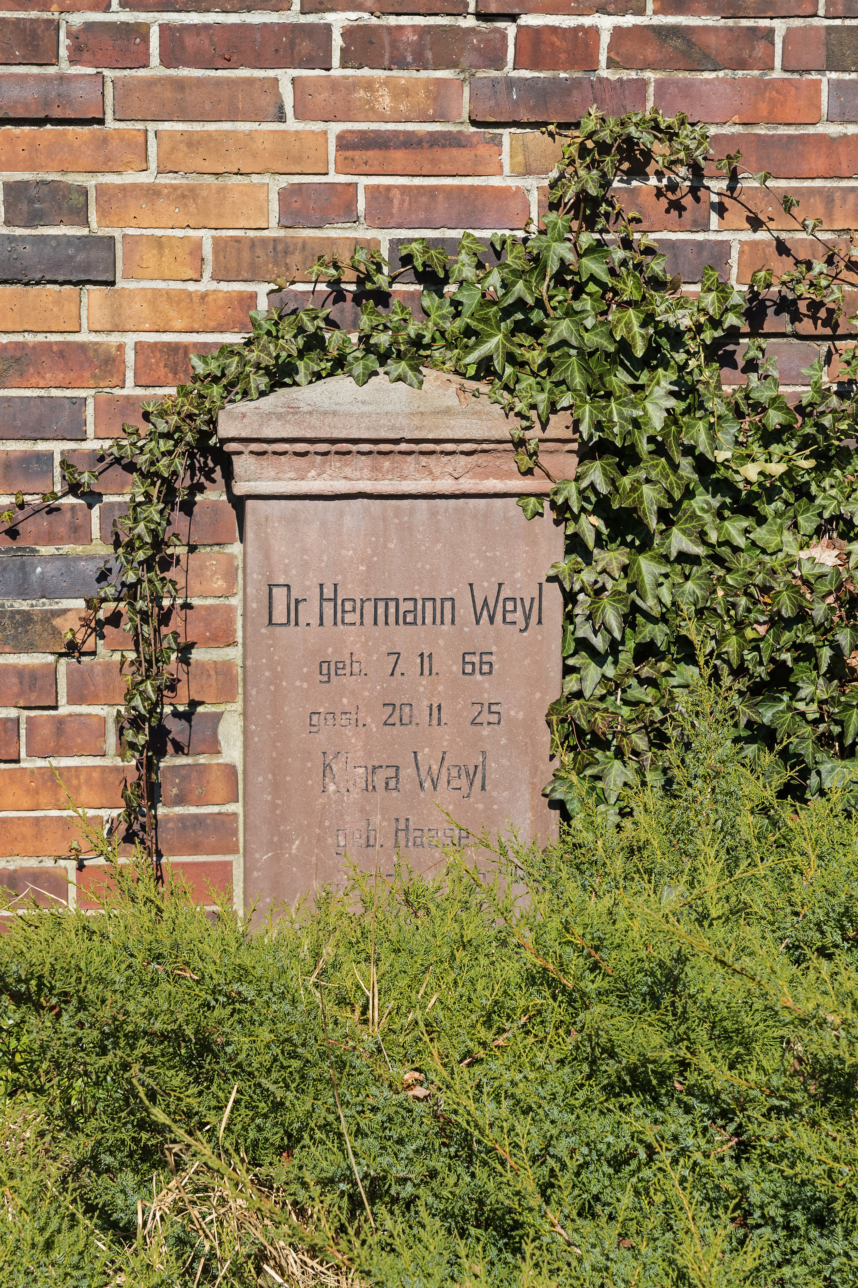 Zentralfriedhof Friedrichsfelde, Berlin-Lichtenberg. Gedenkstätte der Sozialisten, Grab von Dr. Hermann Weyl.